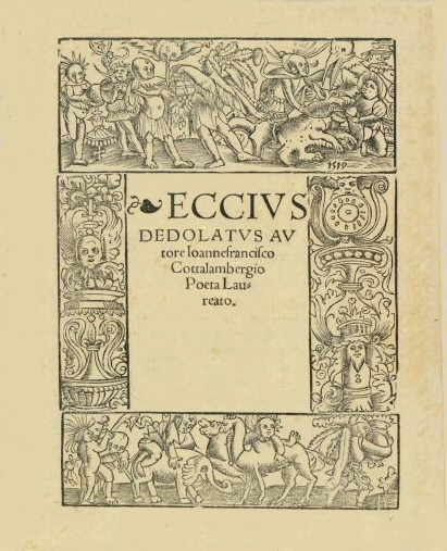 Titelblatt der Spottschrift Eccius Dedolatus gegen Johannes Eck, 1520